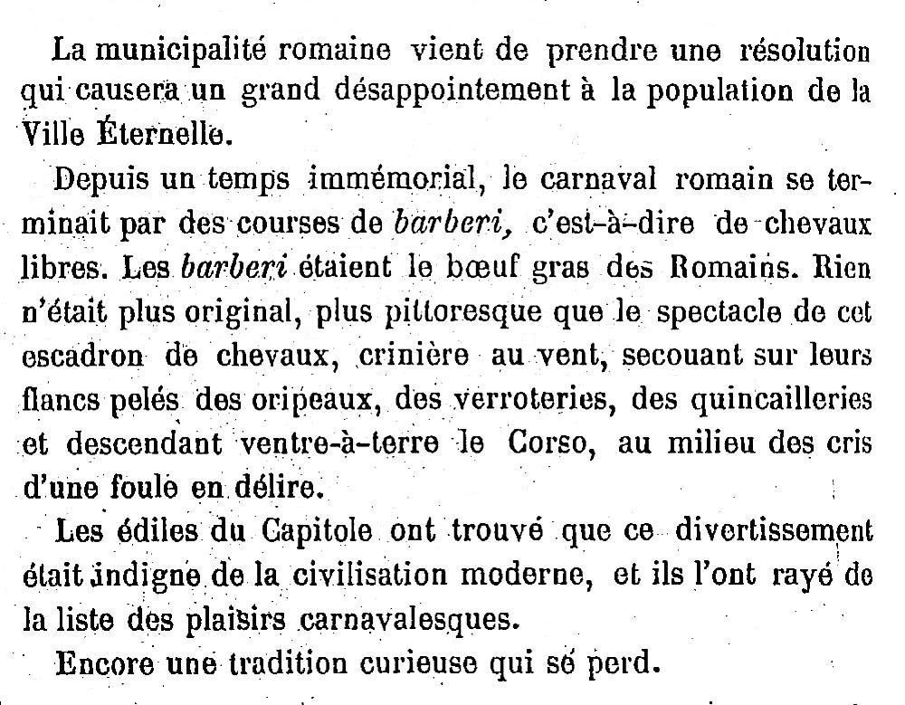 Annonce de la suppression de la course des Barberi au Carnaval de Rome.